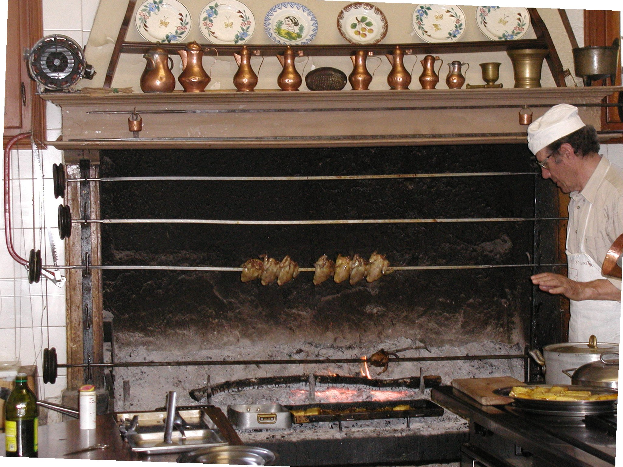 Particolare di camino con spiedo di piccioni durante la cottura